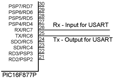 USART